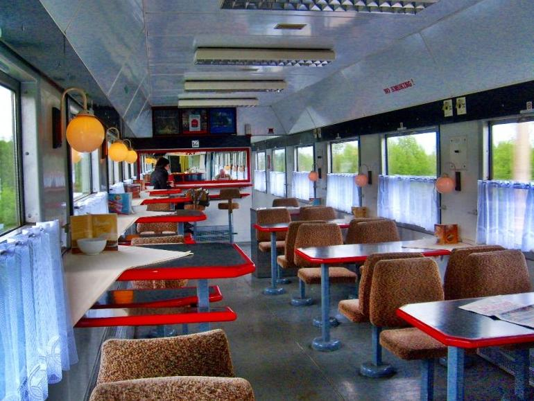 Wagon barowy WARS